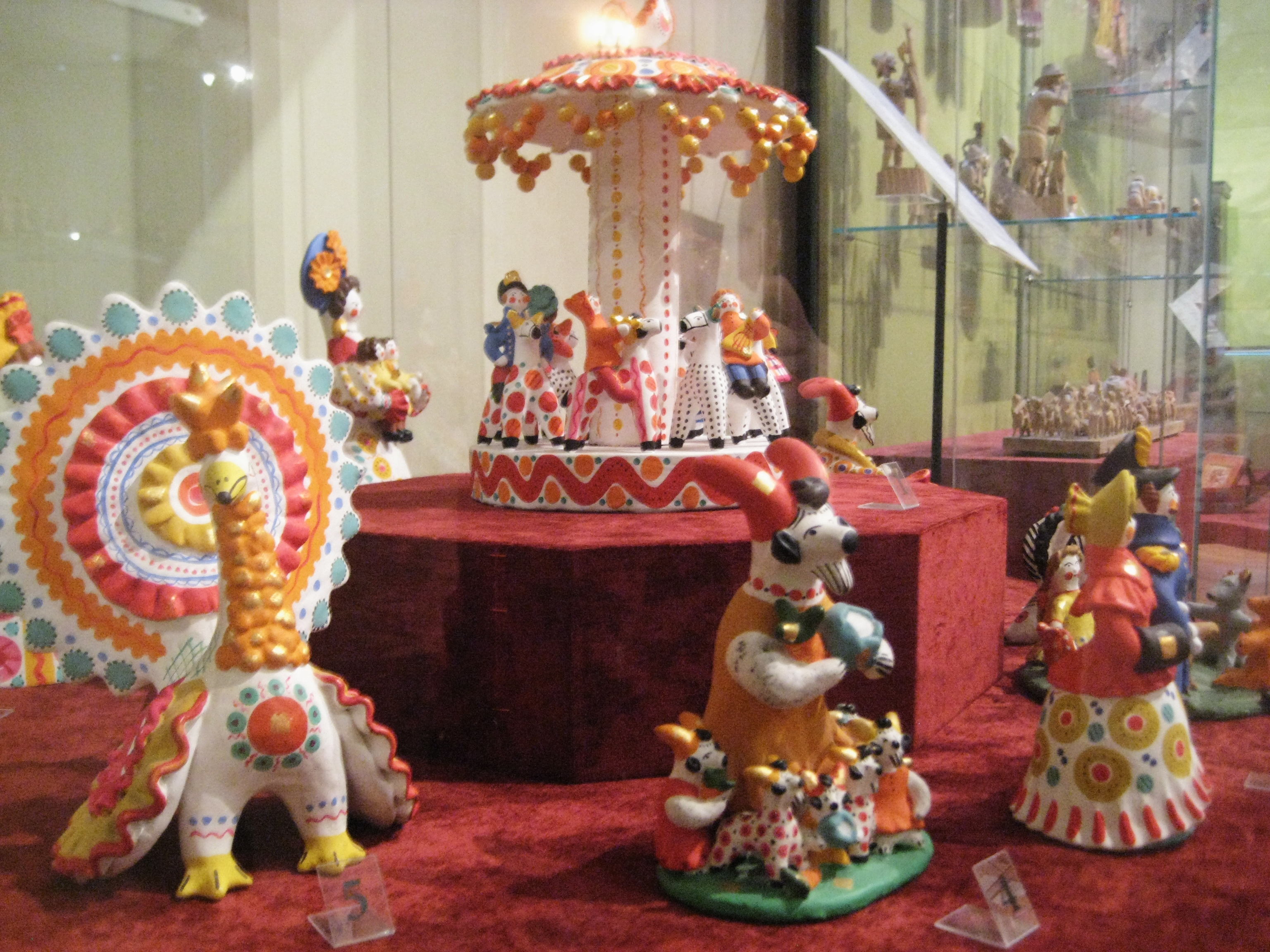 Игрушки